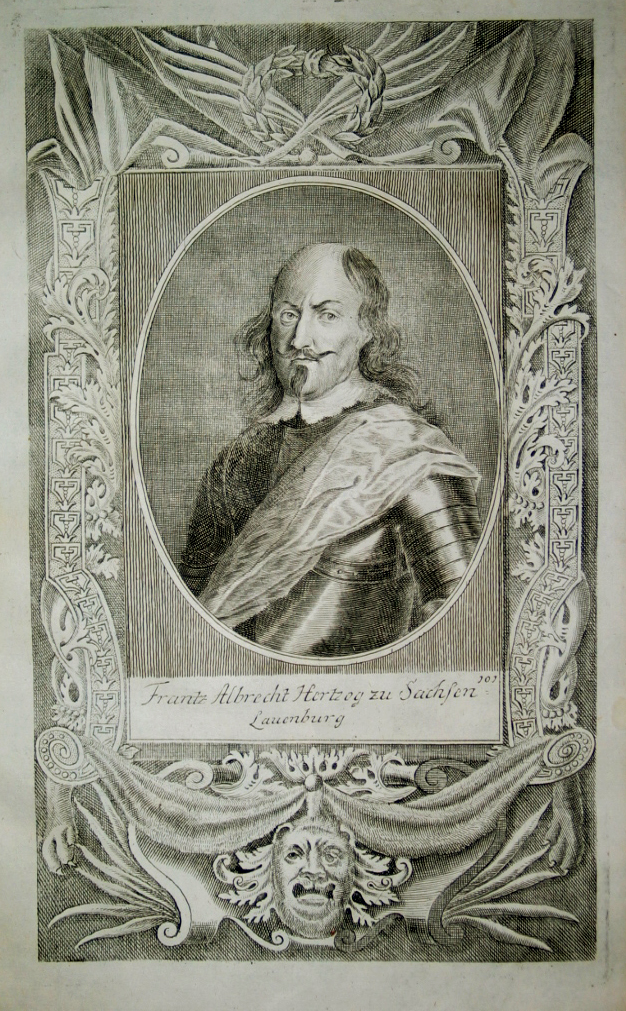 Franz Albrecht von Sachsen-Lauenburg (1598 bis 1642): Frantz Albrecht Hertzog zu Sachsen Lauenburg. Herzog von Sachsen-Lauenburg; kaiserlicher und kursächsischer Feldherr; kursächsischer Feldmarschall